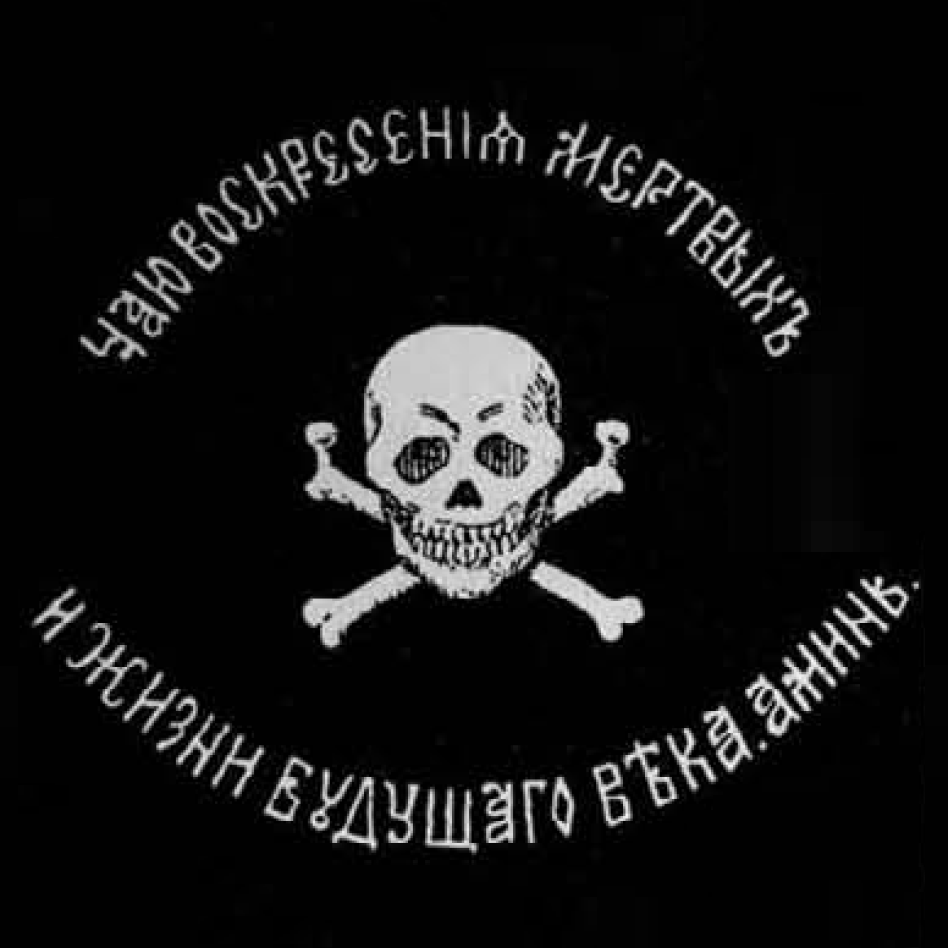 «Баклановский значок» 17-го Донского казачьего полка. XIX век